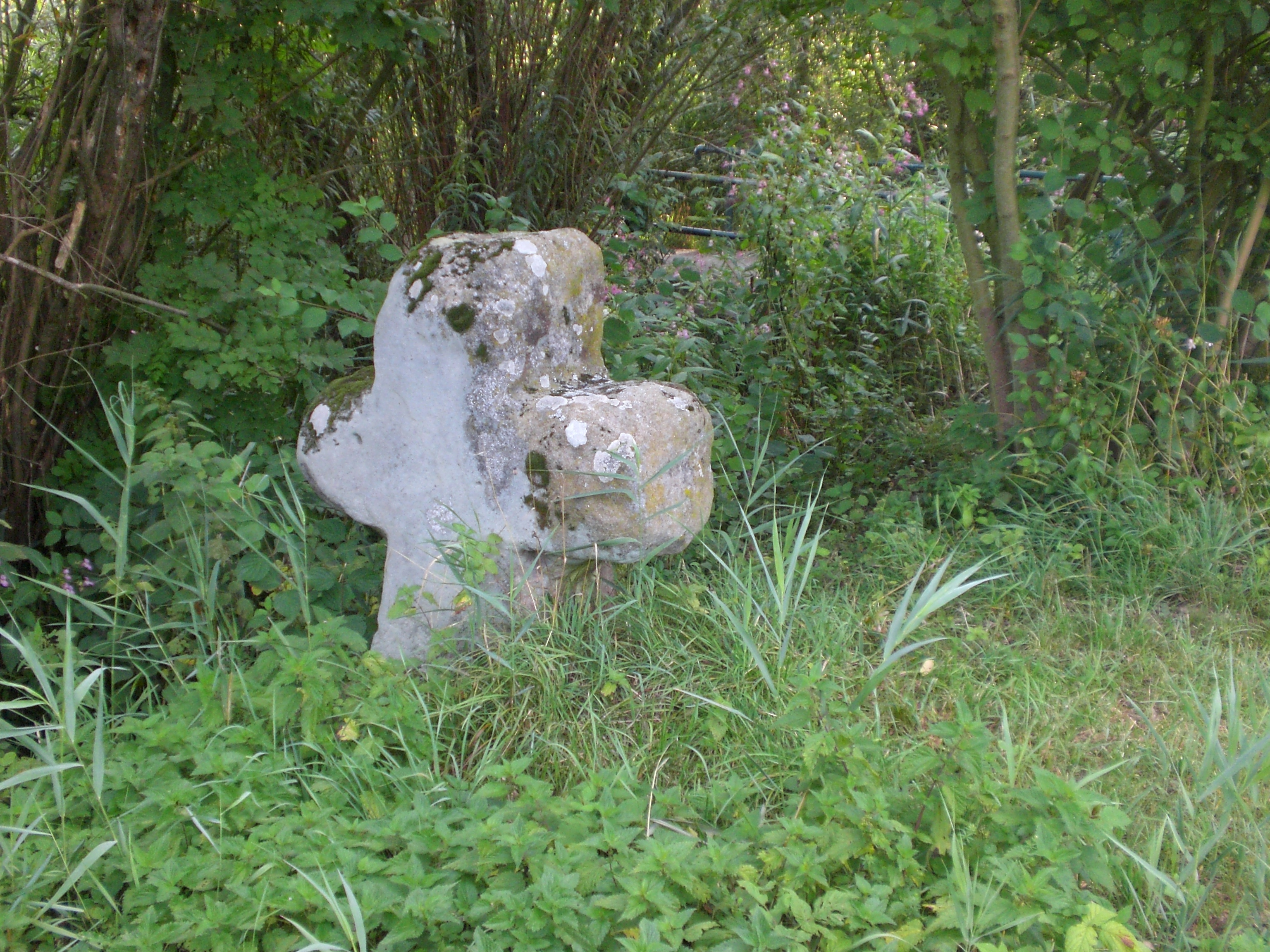 Steinkreuz in Fischbach, D-5-64-000-2243